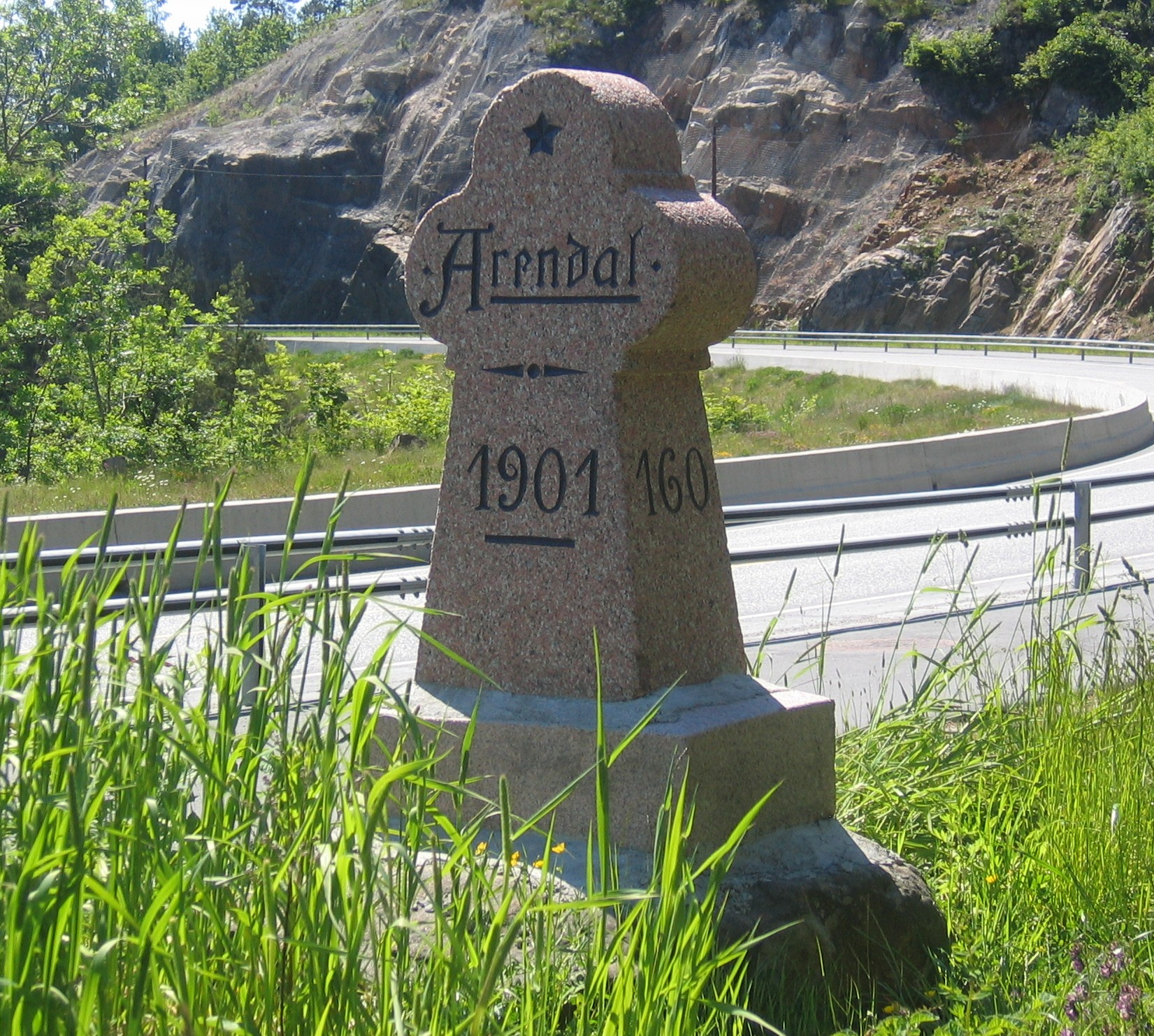 Grensestein Arendal by 1901